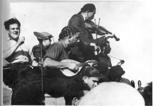 תזמורת מעפילים על סיפון האניה אגיוס ניקולאוס א - פלש טרנספורט .